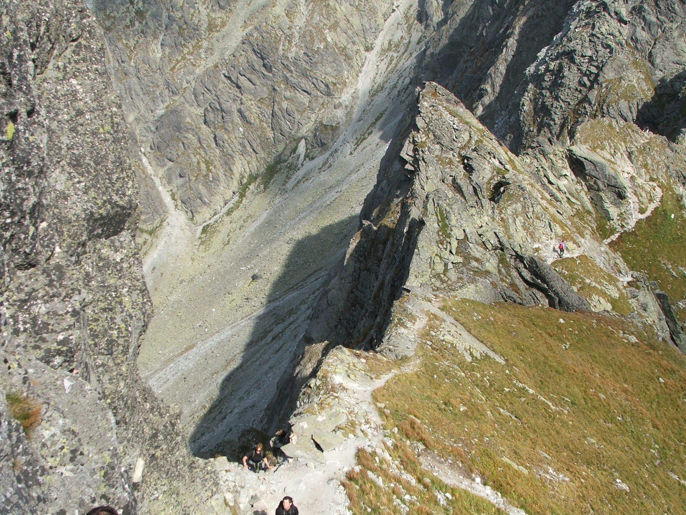 Widok na Buczynowe Czuby i Buczynowe Turnie ze szlaku Orlej Perci